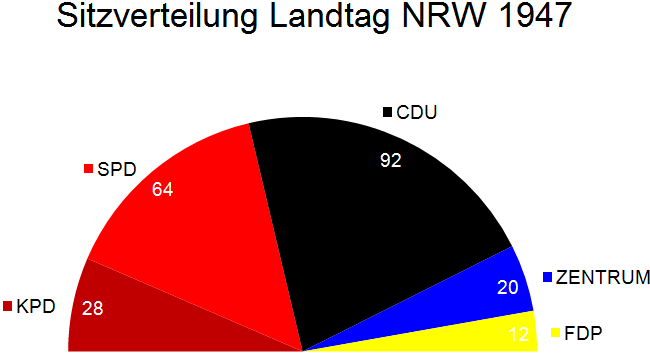 Sitzverteilung im Landtag Nordrhein-Westfalen nach der Landtagswahl in Nordrhein-Westfalen 1947